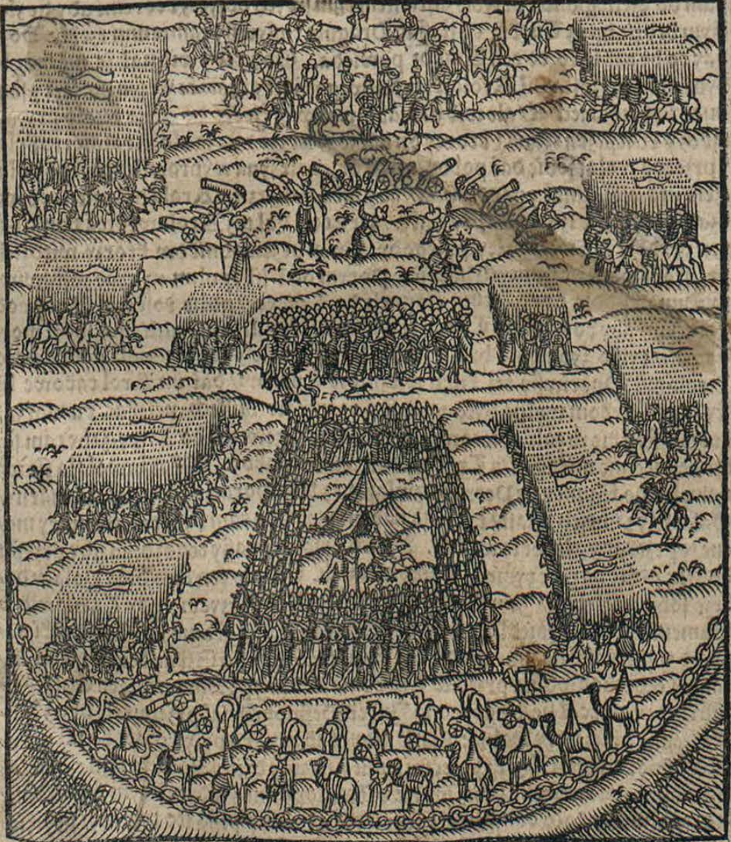 Kronika Polska Marcina Bielskiego-378